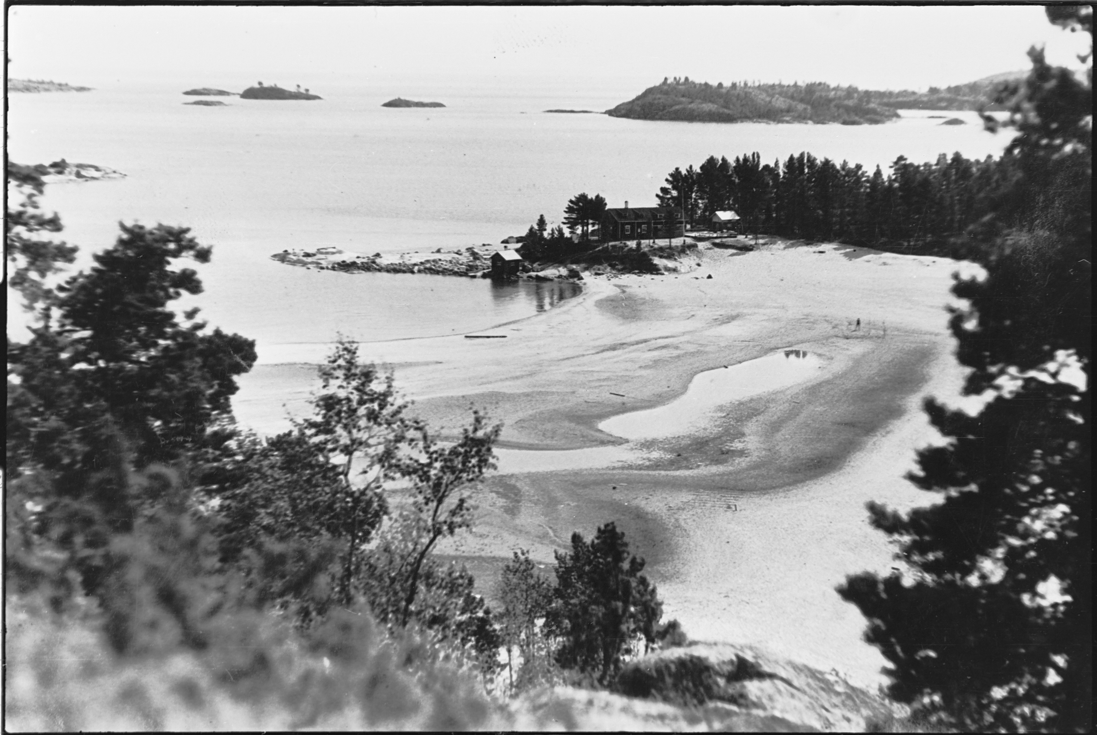 Vätikkä, 1930-е годы.